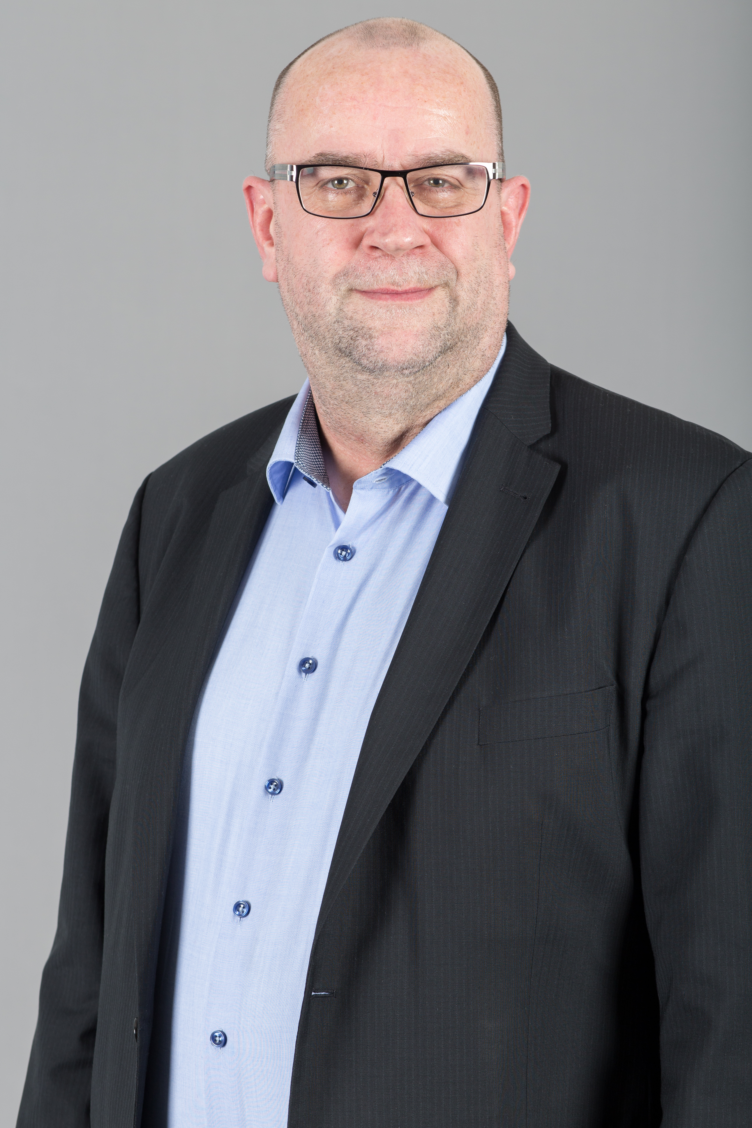 Steffen Harzer